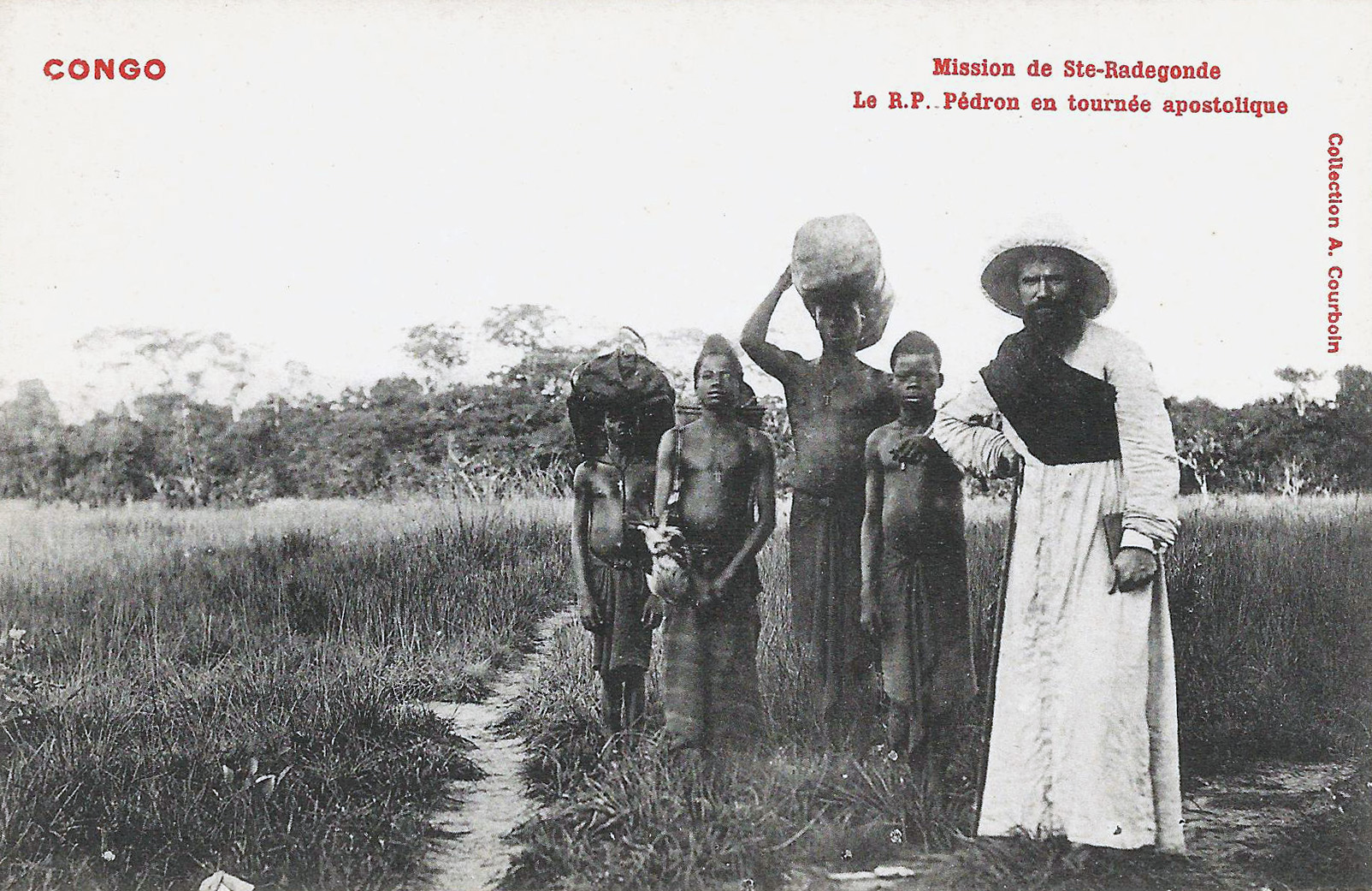 Mission de Sainte-Radegonde. Le R. P. Pédron en tournée apostolique. [Marc Pédron, 1877-1936] Collection A. Courboin Congo